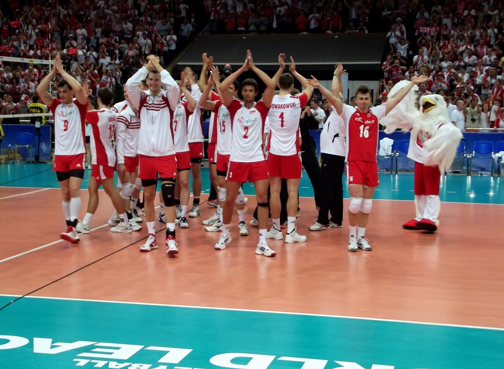 Zdjęcie zrobione podczas zawodów Ligi Światowej 2012 w katowickim Spodku.